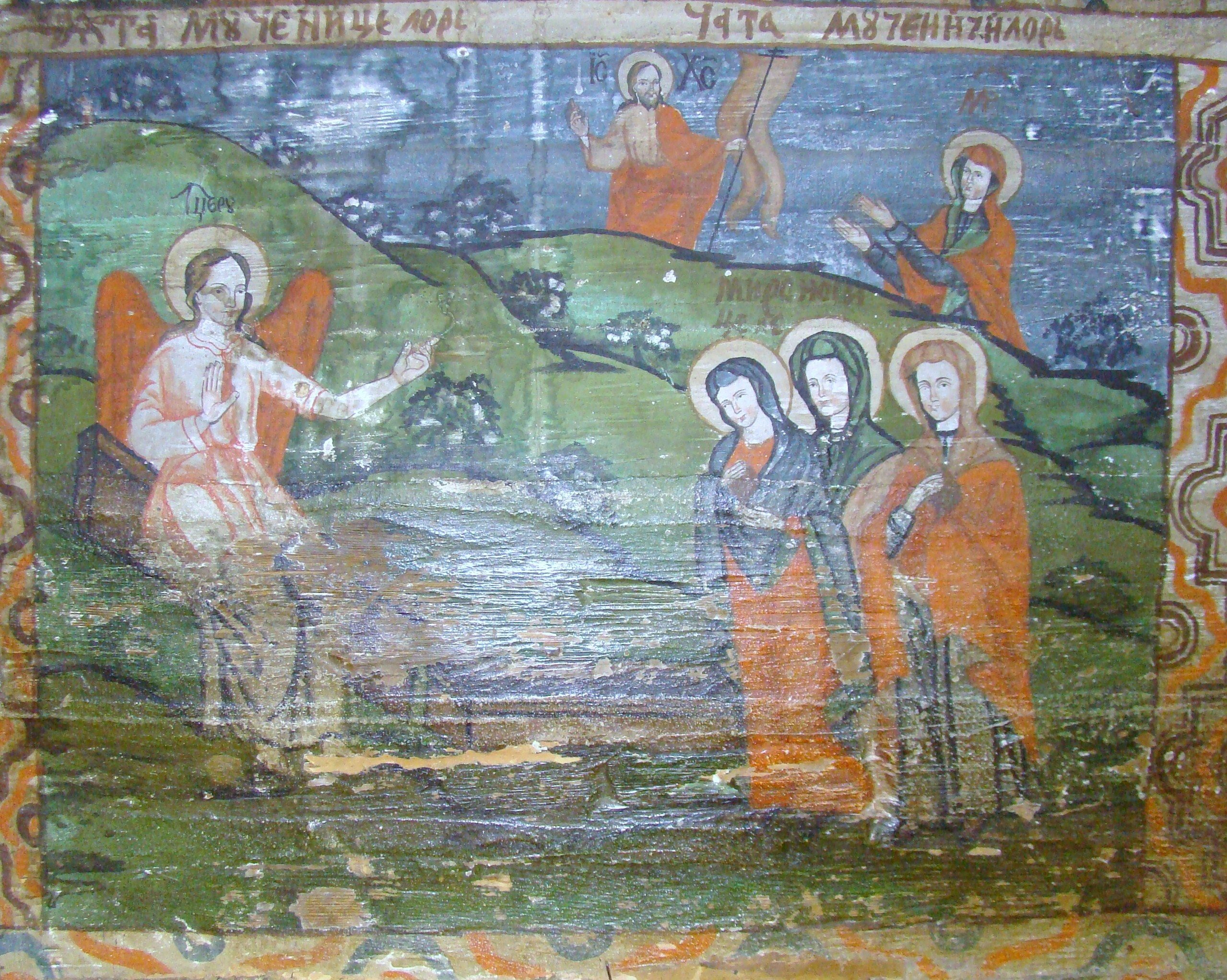 Biserica de lemn "Cuvioasa Paraschiva" , sat POIENILE IZEI